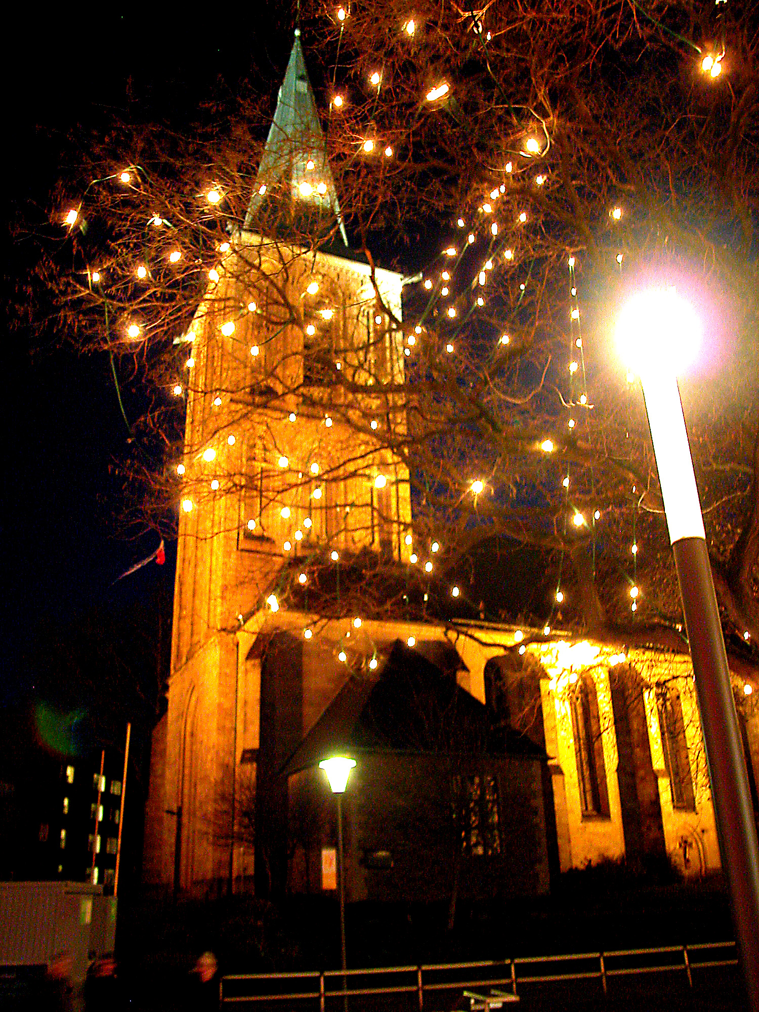 Propsteikirche St. Peter und Paul, Bochum, NRW, Deutschland